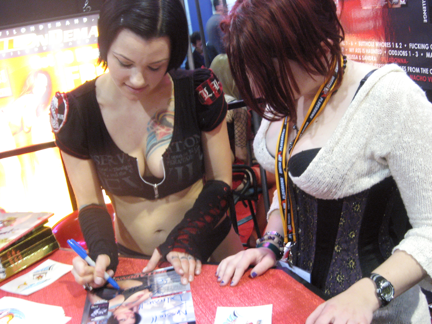 Belladonna